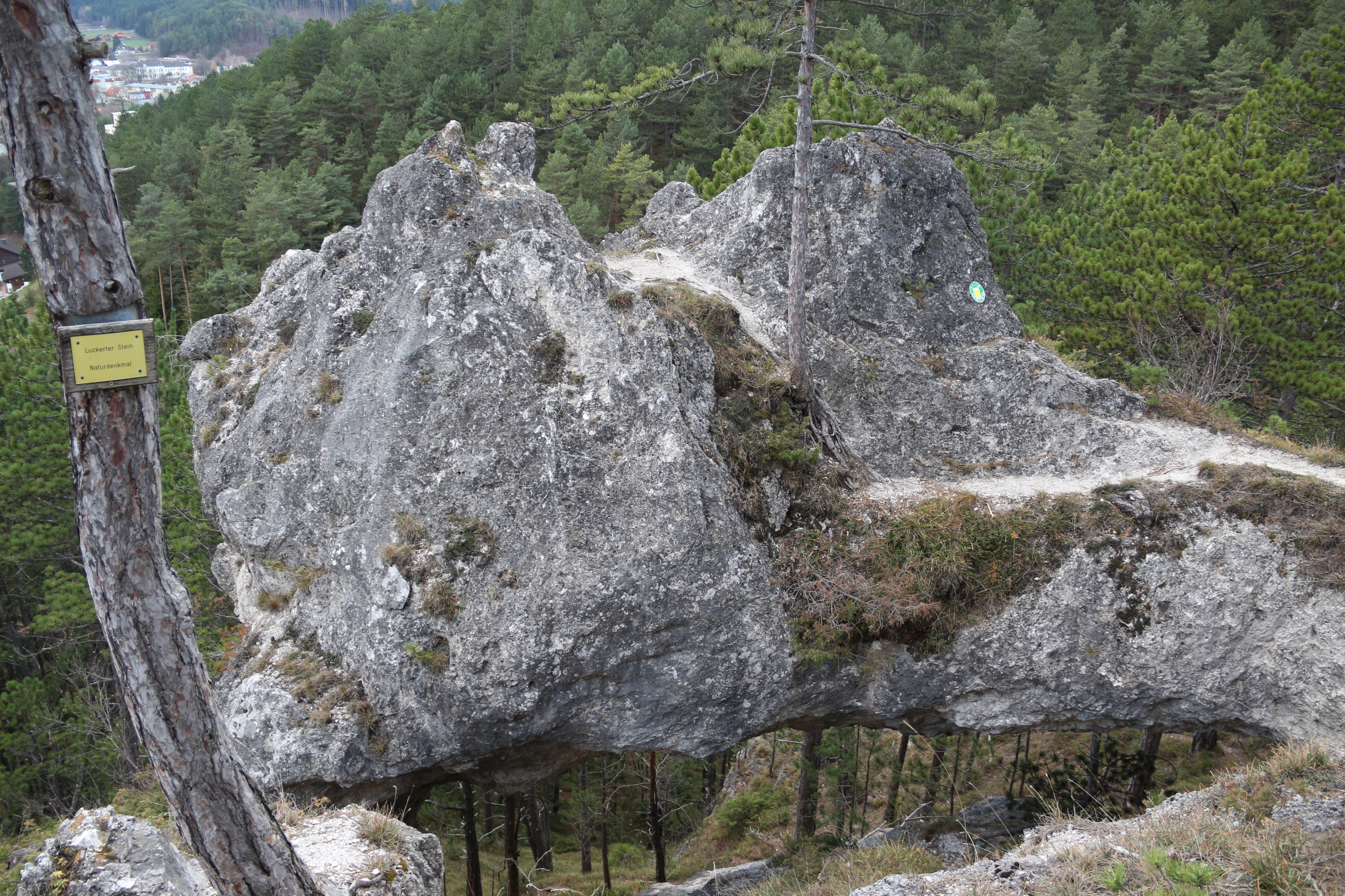 "Luckerter Stein" Kalksteinbrüche #Felsgebilde# This media shows the natural monument in Lower Austria with the ID WB-079.